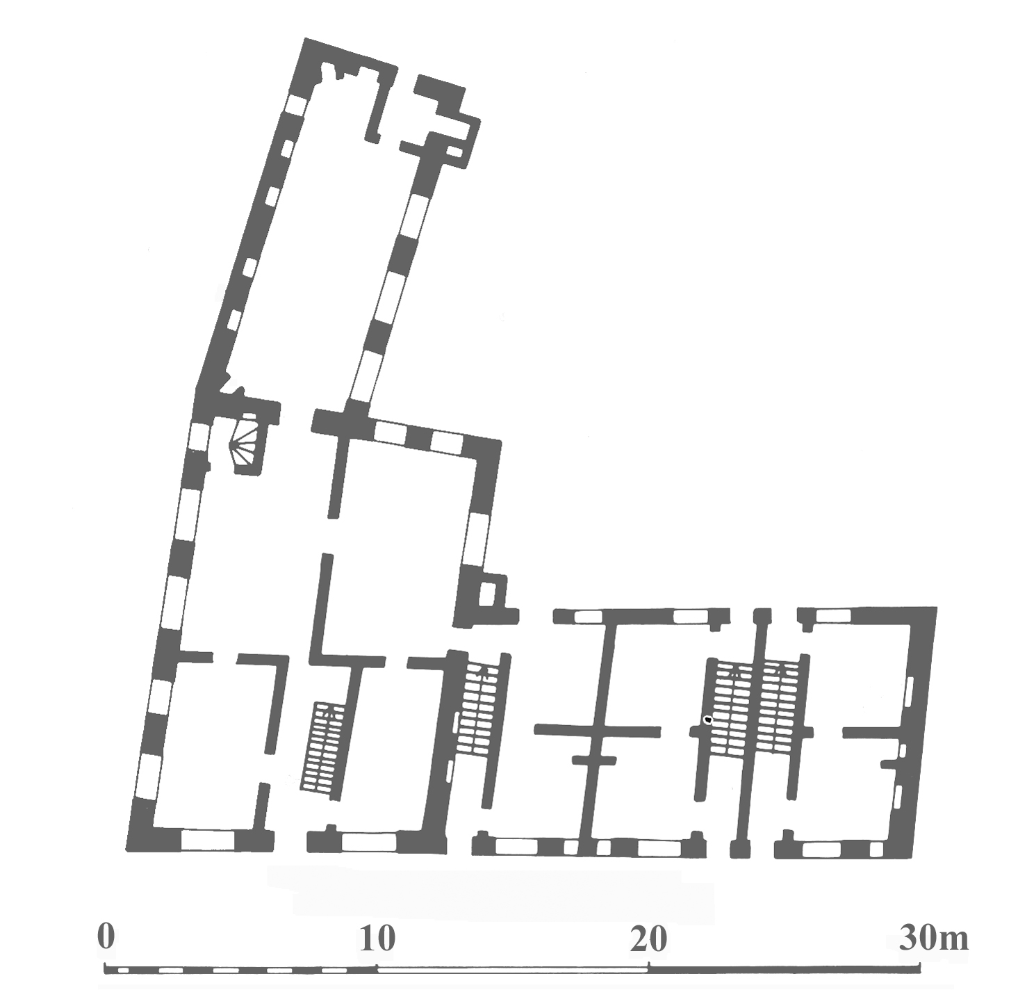 Bottenvåningen i den ursprunliga Jörgen Kocks gård. Rekonstruktion: Sven Rosborn 1978.